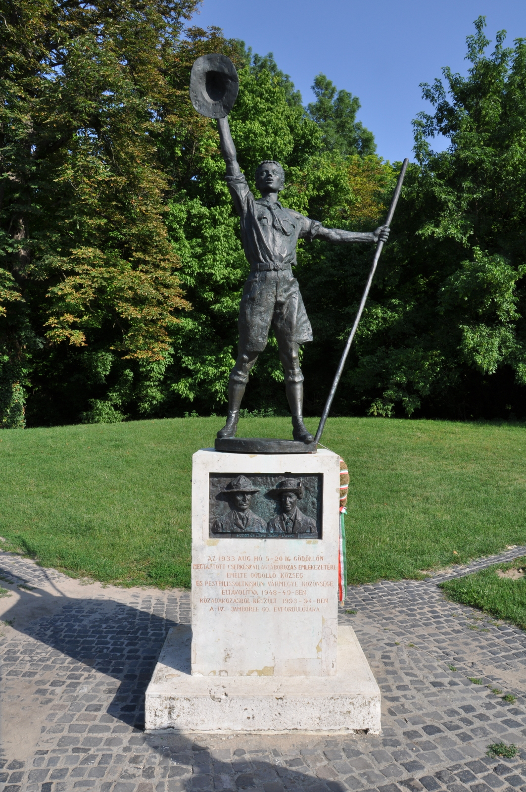 A Cserkészfiú szobrot az 1933-as gödöllői Cserkész Világtalálkozó 10. évfordulója alkalmából állították fel, és 1943. október 17-én leplezték le. A szobor 1948-ig a testőrlaktanya előtt állt, de a mozgalom megszüntetése után ledöntötték. 1989-ben, a cserkészet újjászervezésének idején merült fel a szobor visszaállításának gondolata. Mivel az eredeti alkotás nem került elő, ezért a szoborbizottság Kisfaludi Strobl Zsigmond Cserkészfiú című, 1929-ben készült kisplasztikájának felnagyíttatása mellett döntött. Az 50 cm-es szobor felnagyítását Kisfaludi Strobl egyik tanítványa, Paál István készítette el. A régi talapzaton álló új cserkész-szobrot 1994. április 24-én leplezték le. A talapzaton látható új domborművek: - Robert és Olave Lord Baden Powell, a nemzetközi cserkészmozgalom alapítói;- Lindenmeyer Antónia a Pax Ting szervezője; - gróf Teleki Pál főcserkész, a gödöllői jamboree szervezője